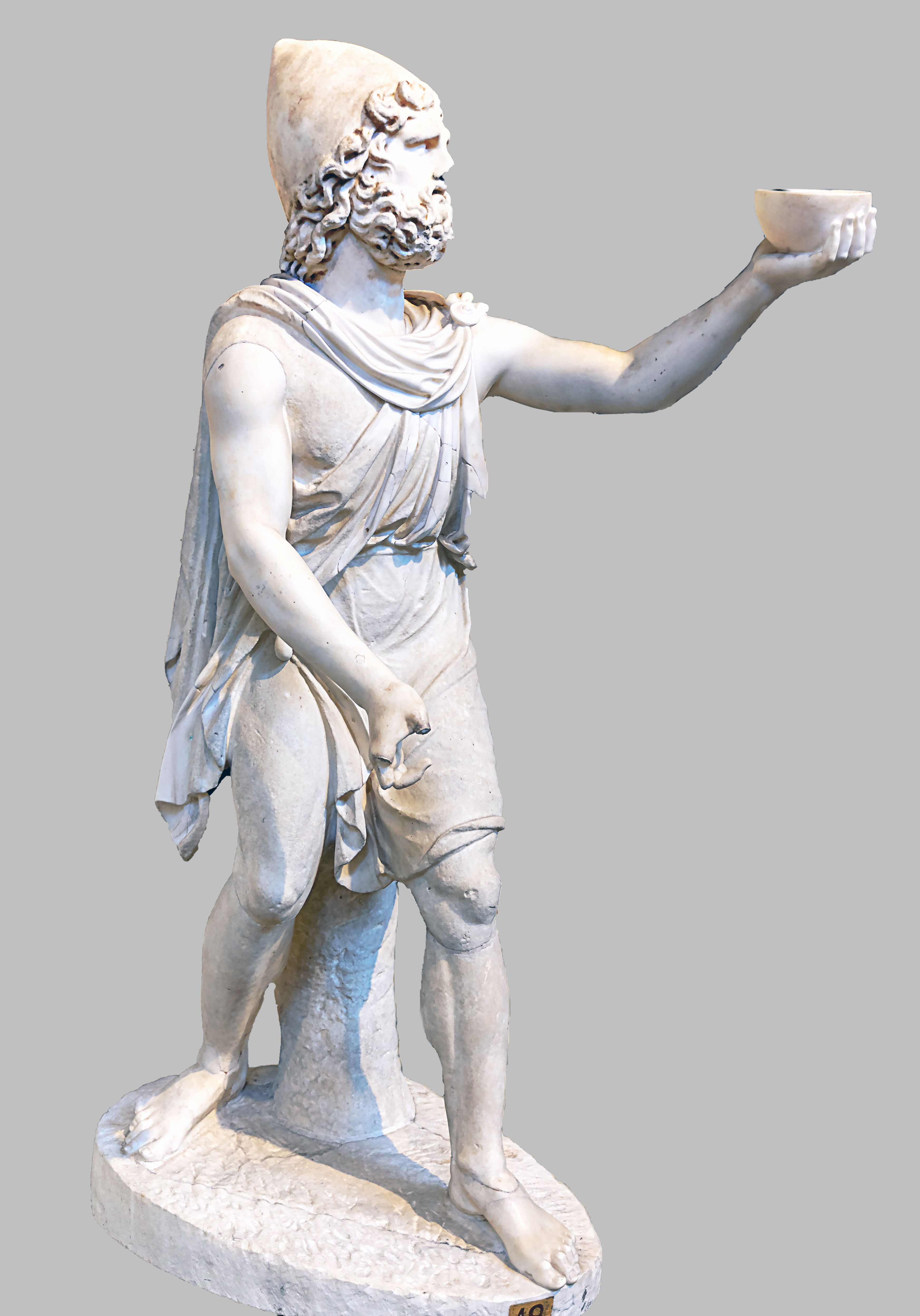 Römische Statuette des Odysseus aus der zweiten Hälfte des 2. Jahrhunderts nach einem hellenistischen Vorbild angefertigt. Ausgestellt in den Vatikanischen Museen (Inv. 1905)